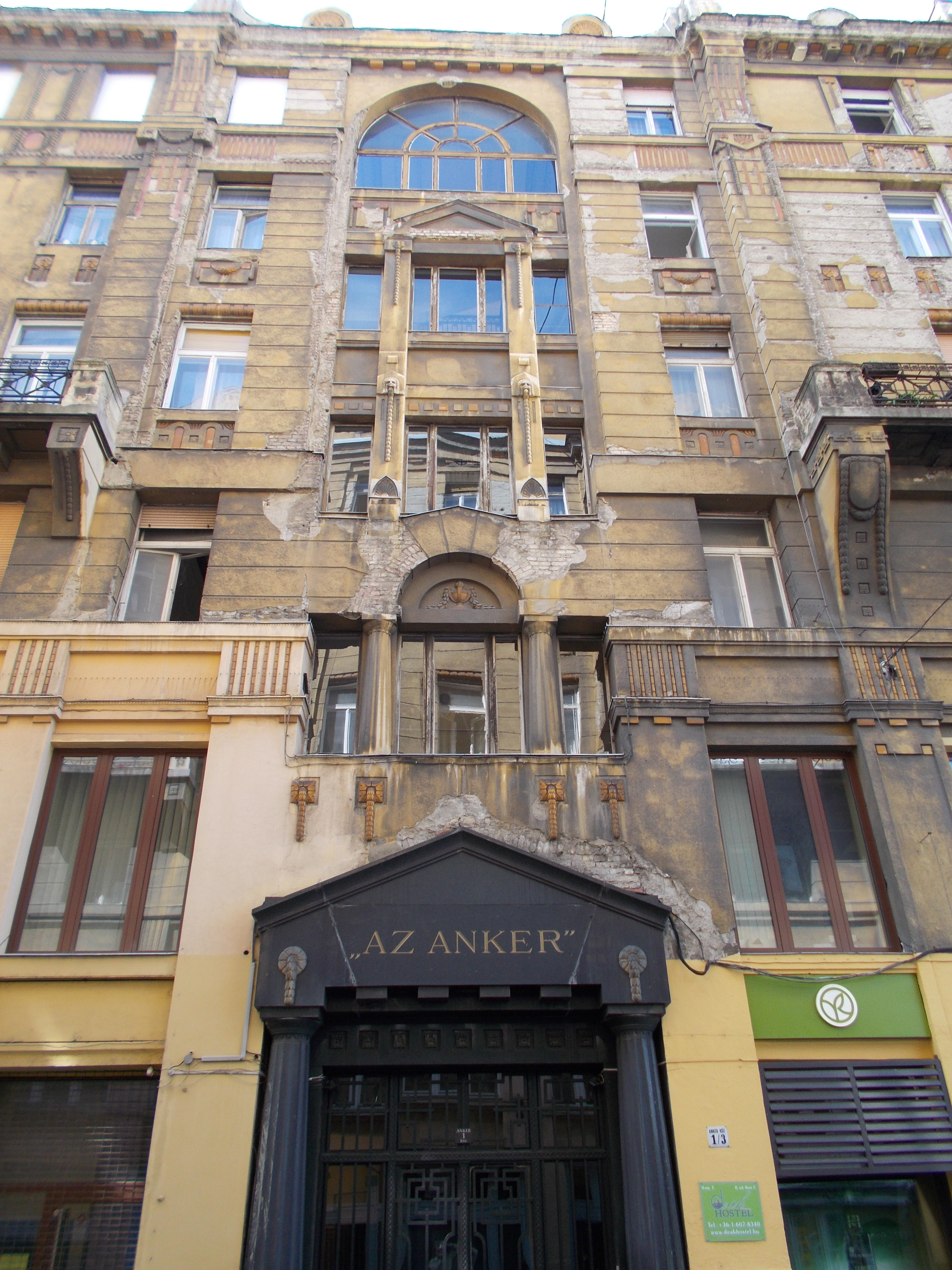 Anker-ház. Középső rész. Műemlék ID 12151 - Budapest 6. kerület. Anker köz 1-3 (a másik oldal a Károly körútra néz)